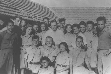 בגין עם משוחררי האצ"ל